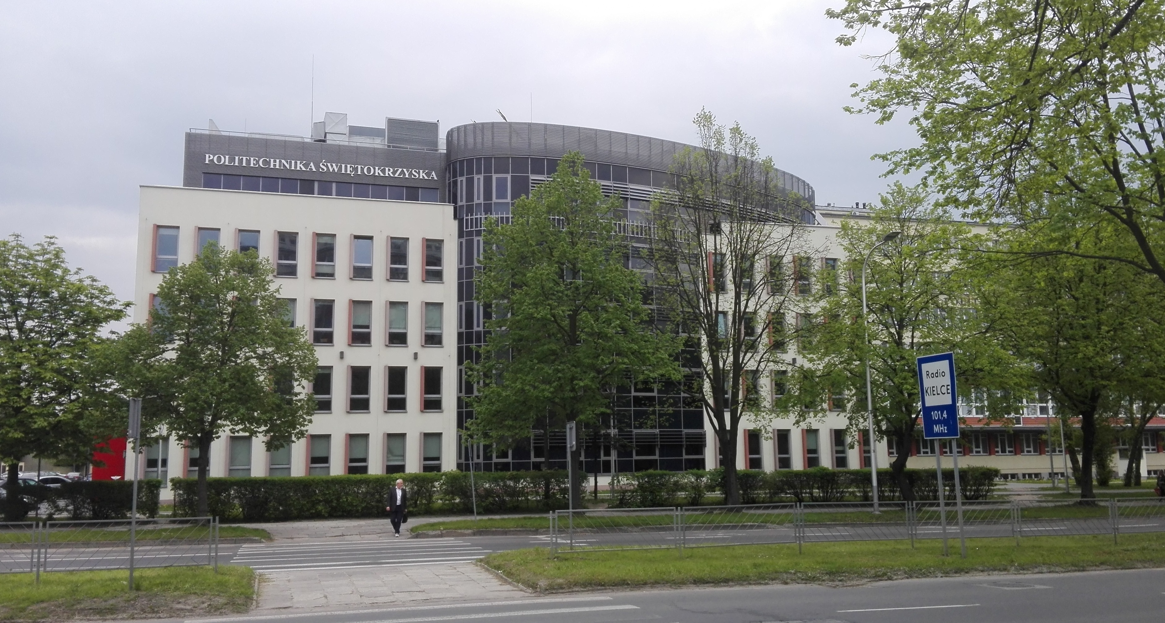 Wydział Inżynierii Środowiska, Geomatyki i Energetyki Politechniki Świętokrzyskiej (budynek Energis otwarty w 2012 r.). Widok od ul. Warszawskiej